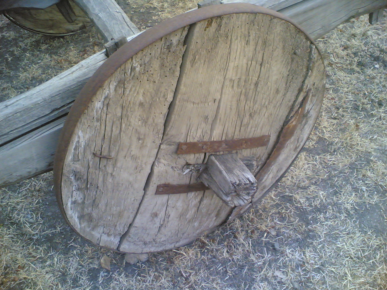 tahta kağnı tekerleği